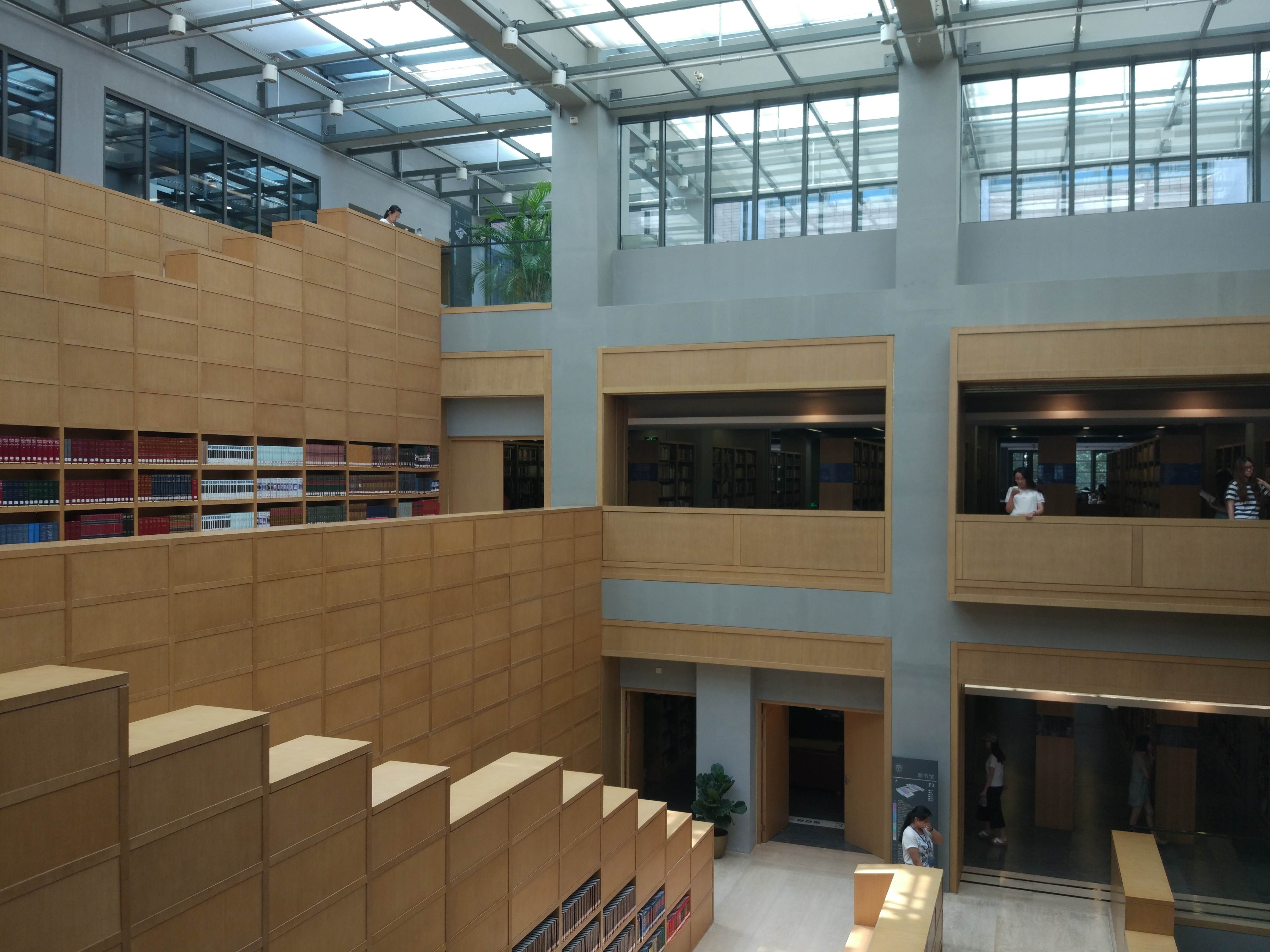 北京外国语大学图书馆大厅，摄于2016年6月